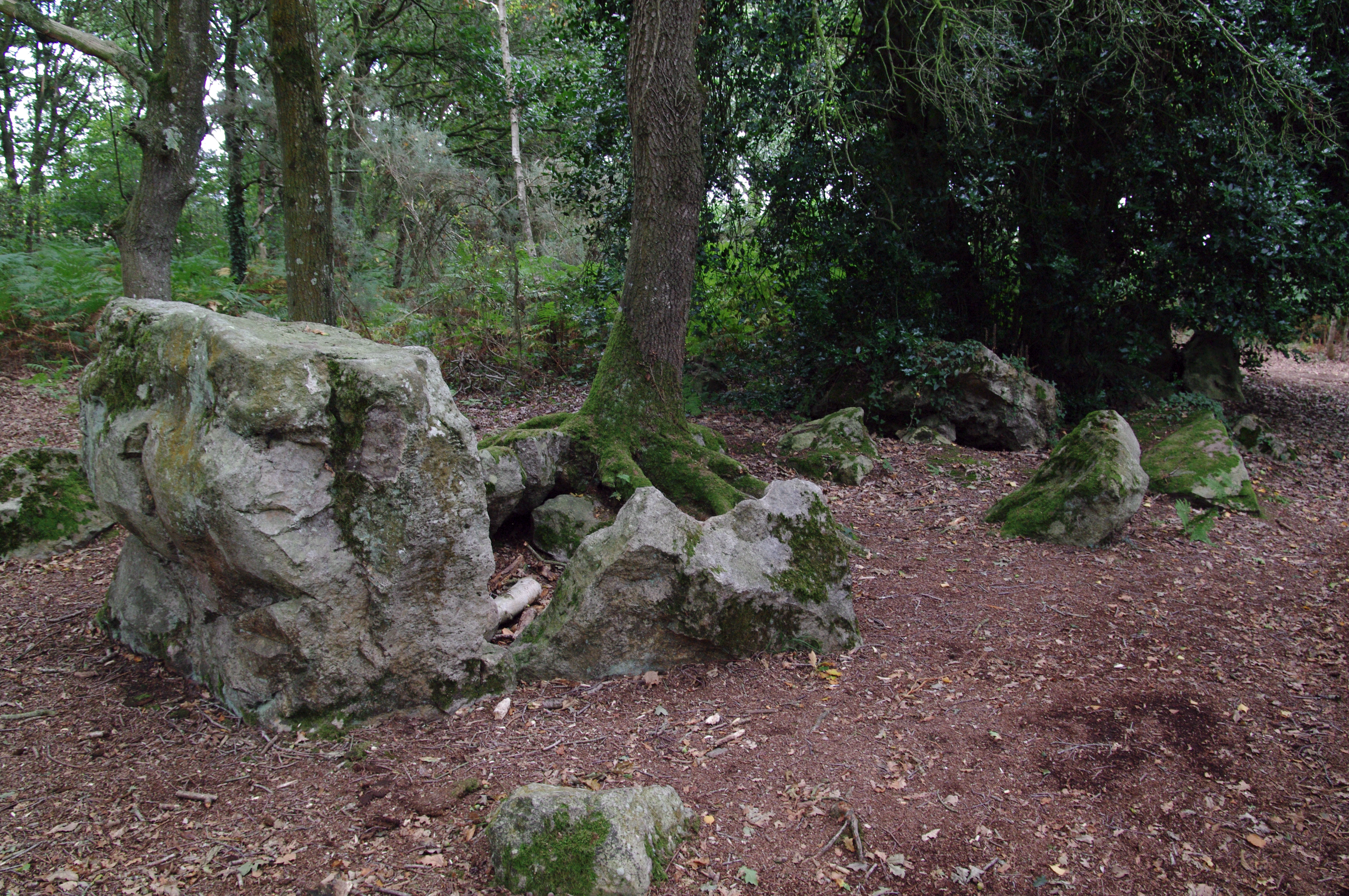 Site mégalithique de la Lande du Gras (Inscription Classement) .